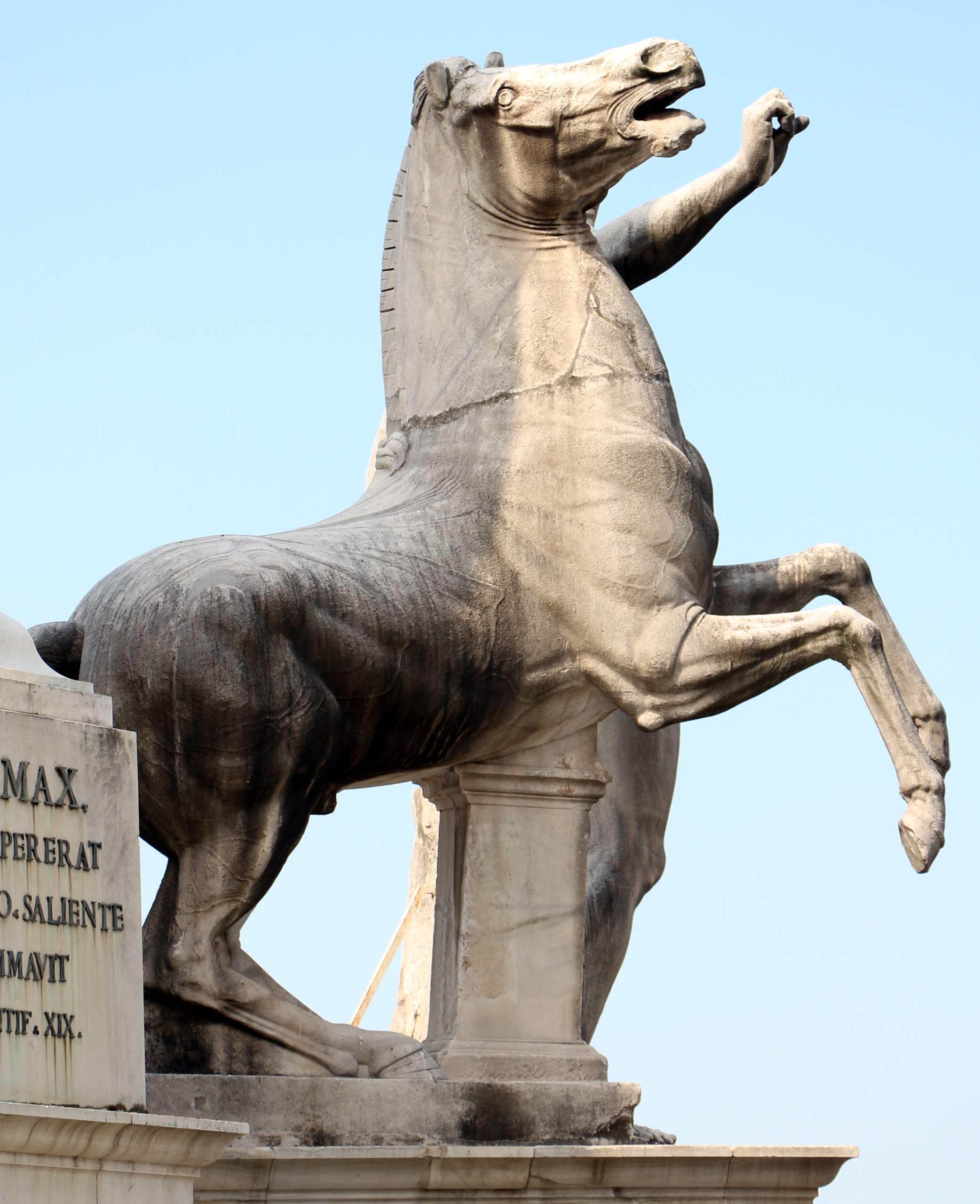 Roma, miscellanea